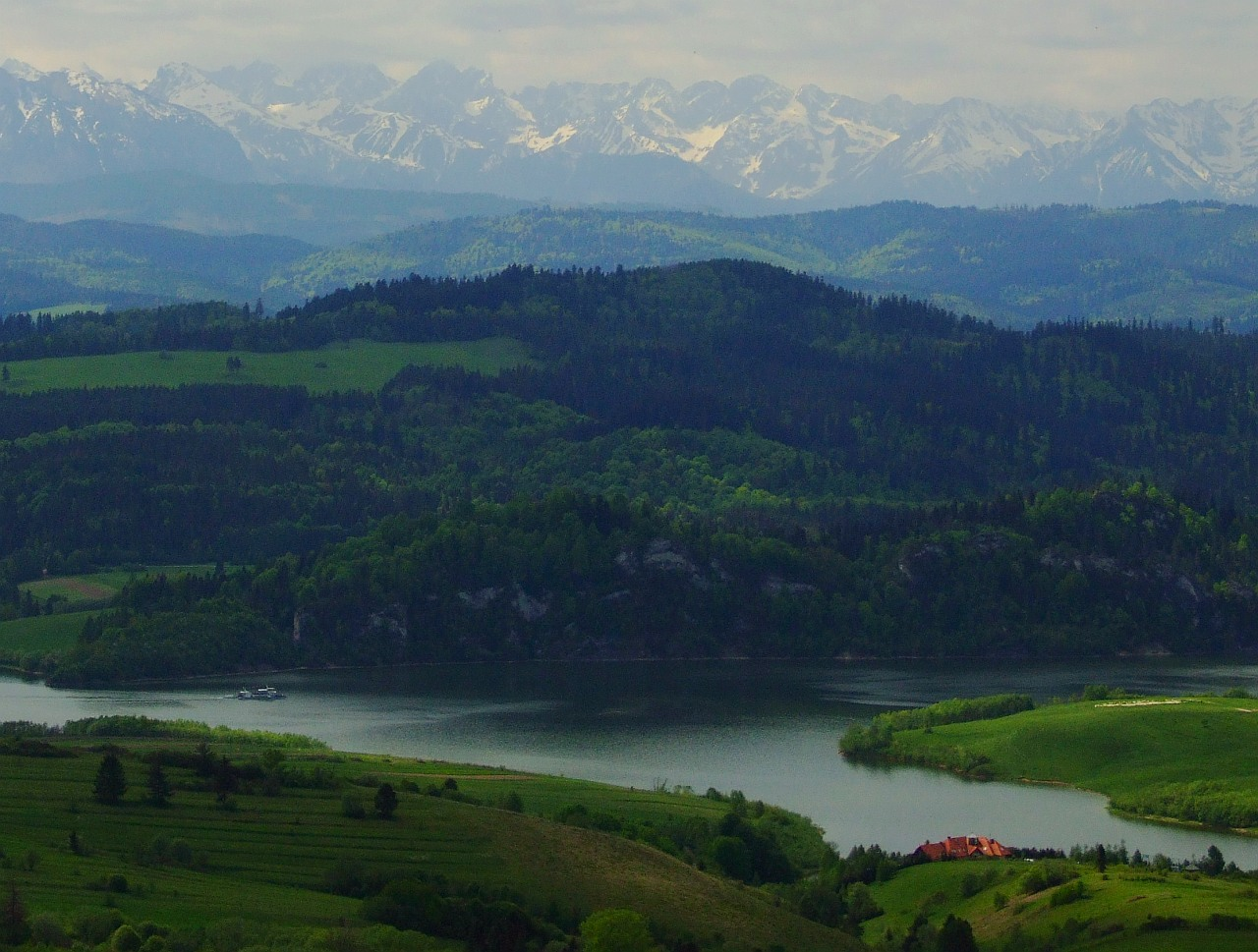 Widok z góry Wdżar.Od dołu:Zbiornik Czorsztyński, Zielone skałki, Pieniny Spiskie (Cisówka), Zamagurze, Tatry